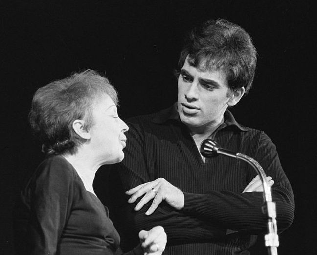 Édith Piaf tijdens een optreden in Rotterdam. Hier samen met haar echtgenoot Theo Sarapo.